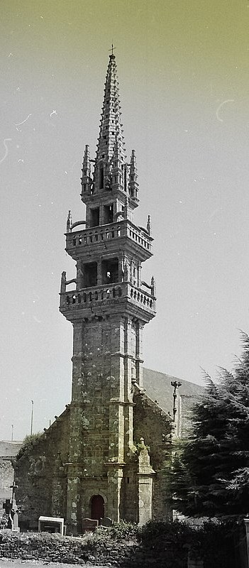 église Saint Servais, denez goasguen.